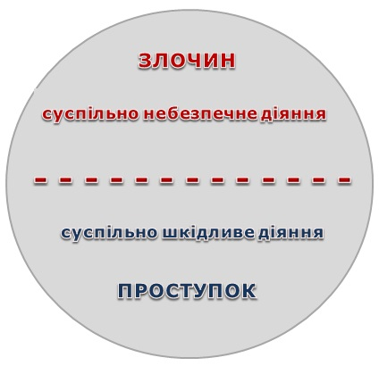 Делікт